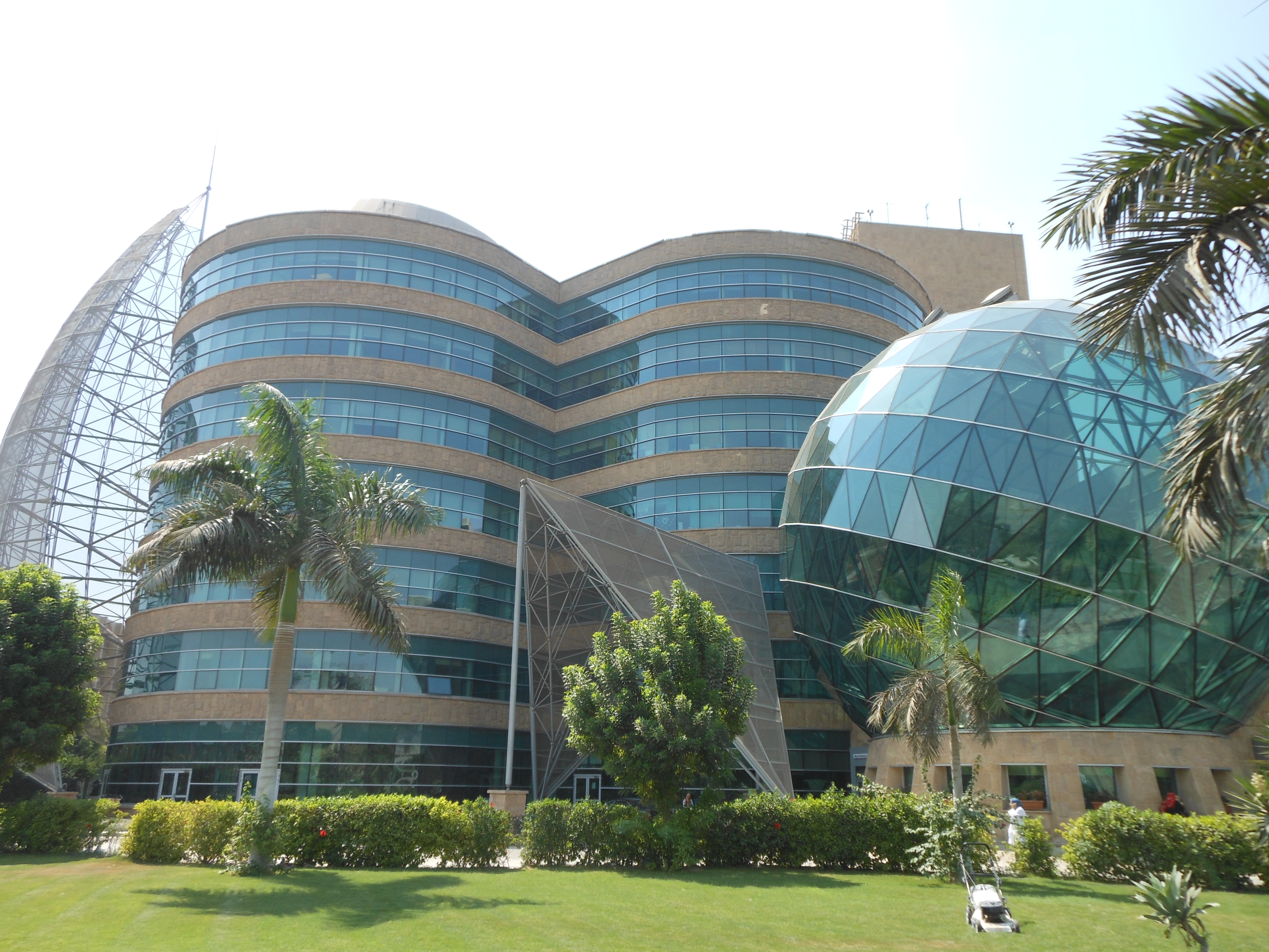 حديث - العلم - روعة التصميم - حداثة المعمار- الامل - سفينة النجاة - المستقبل - اشجار النخيل - السيدة زينب - مصر القديمة